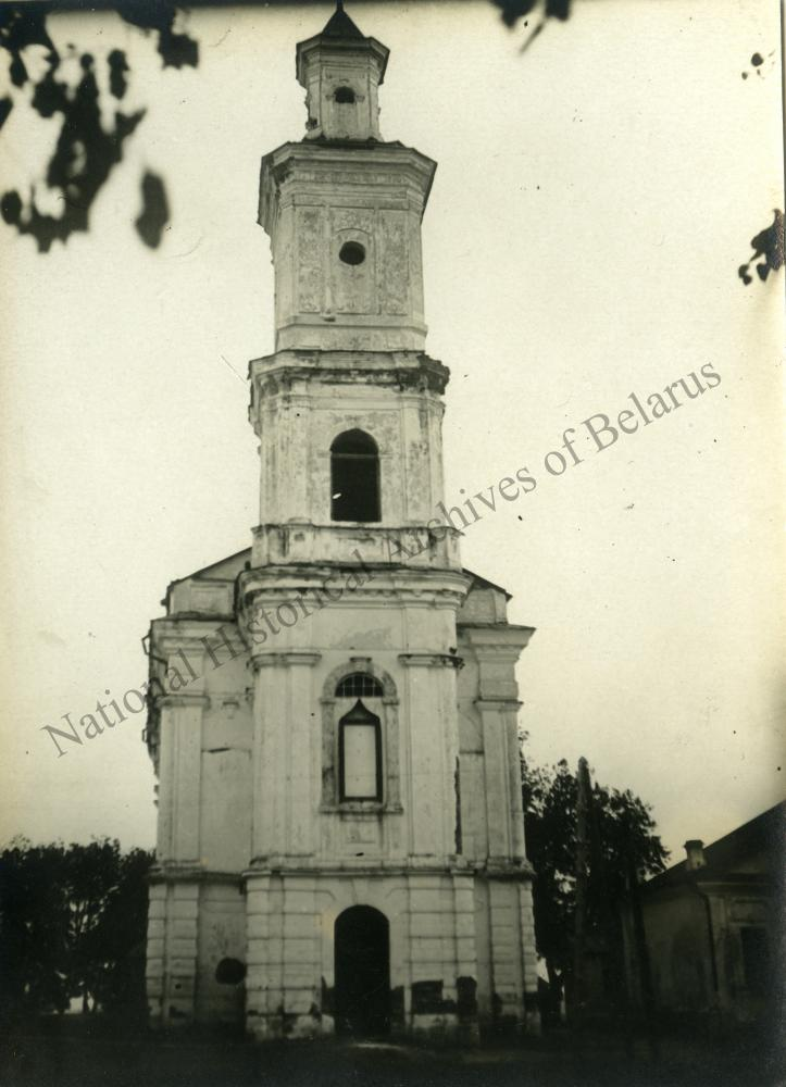 Беларуская (тарашкевіца): Сялец (Sialec), або Ануфрыева (Anufryjeva). Царква Сьвятога Ануфрыя